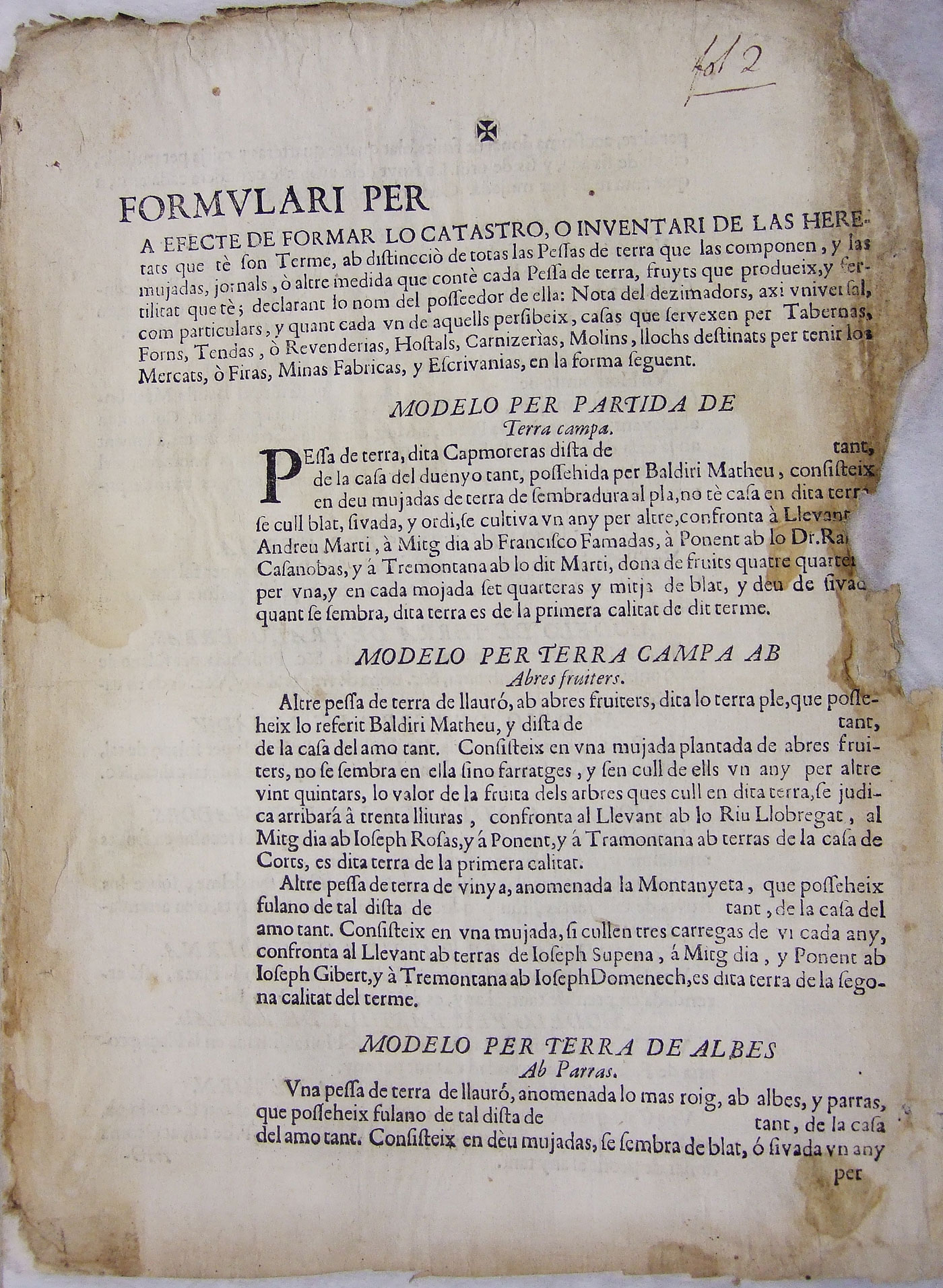 Escaneig de l'original del Reial Cadastre de Catalunya, impost borbònic.